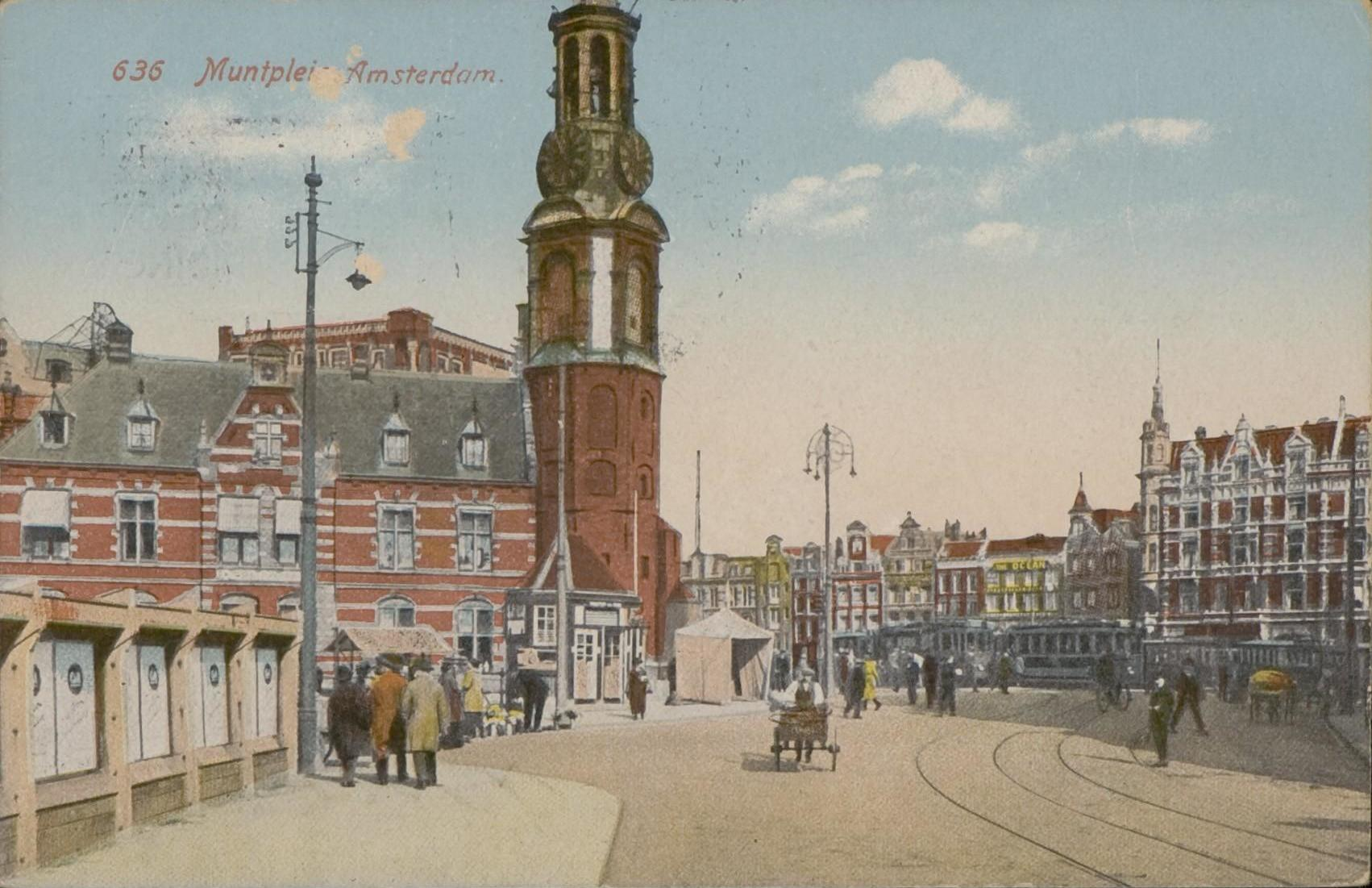 Beschrijving Muntplein met links omheining met informatieborden op de plaats waar Hotel Central gebouwd wordt. Ingekleurde prentbriefkaart Documenttype prentbriefkaart Vervaardiger Onbekend Anoniem Collectie Collectie Stadsarchief Amsterdam: prentbriefkaarten Datering 1926 ca. Geografische naam Muntplein Gebouw Munttoren Inventarissen Afbeeldingsbestand PBKD00281000002